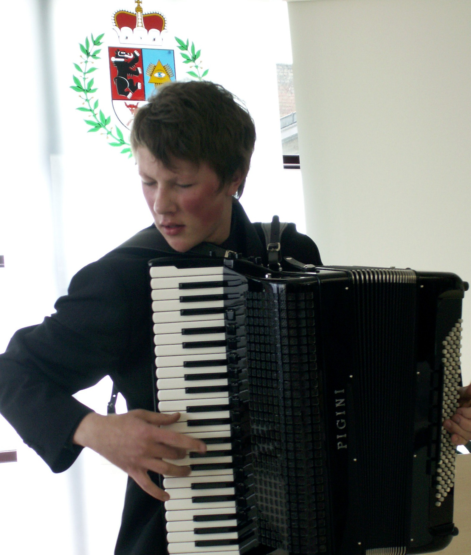 Martynas Levickis, akordeonininkas, Lietuva